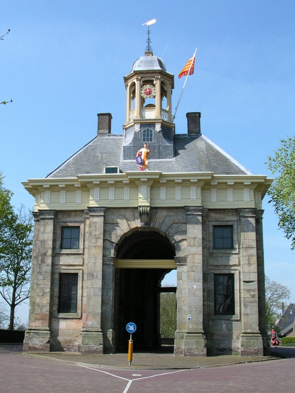 De Westerpoort/Koepoort van de stad Enkhuizen, uit 1649. The Westerpoort/Koepoort, city gate of the city Enkhuizen, bild in 1649.